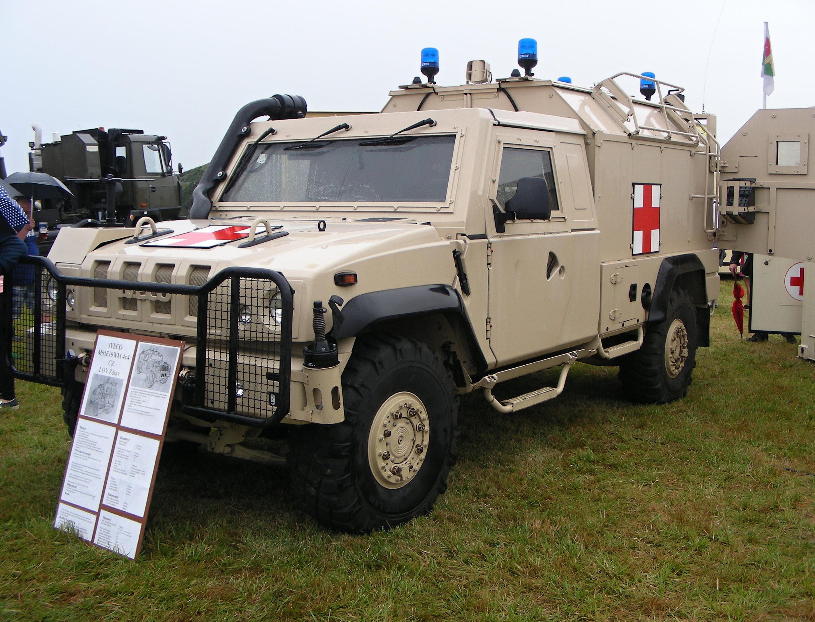 LOV Zdrav: Pancéřovaná sanitní verze s vyvýšenou a plně klimatizovanou nástavbou pro rychlou evakuaci jednoho ležícího a až dvou sedících raněných přímo z bojové zóny a jejich stabilizaci i udržení jejich životních funkcí během přepravy do zdravotnického zařízení. V roce 2010 dodána tři vozidla.